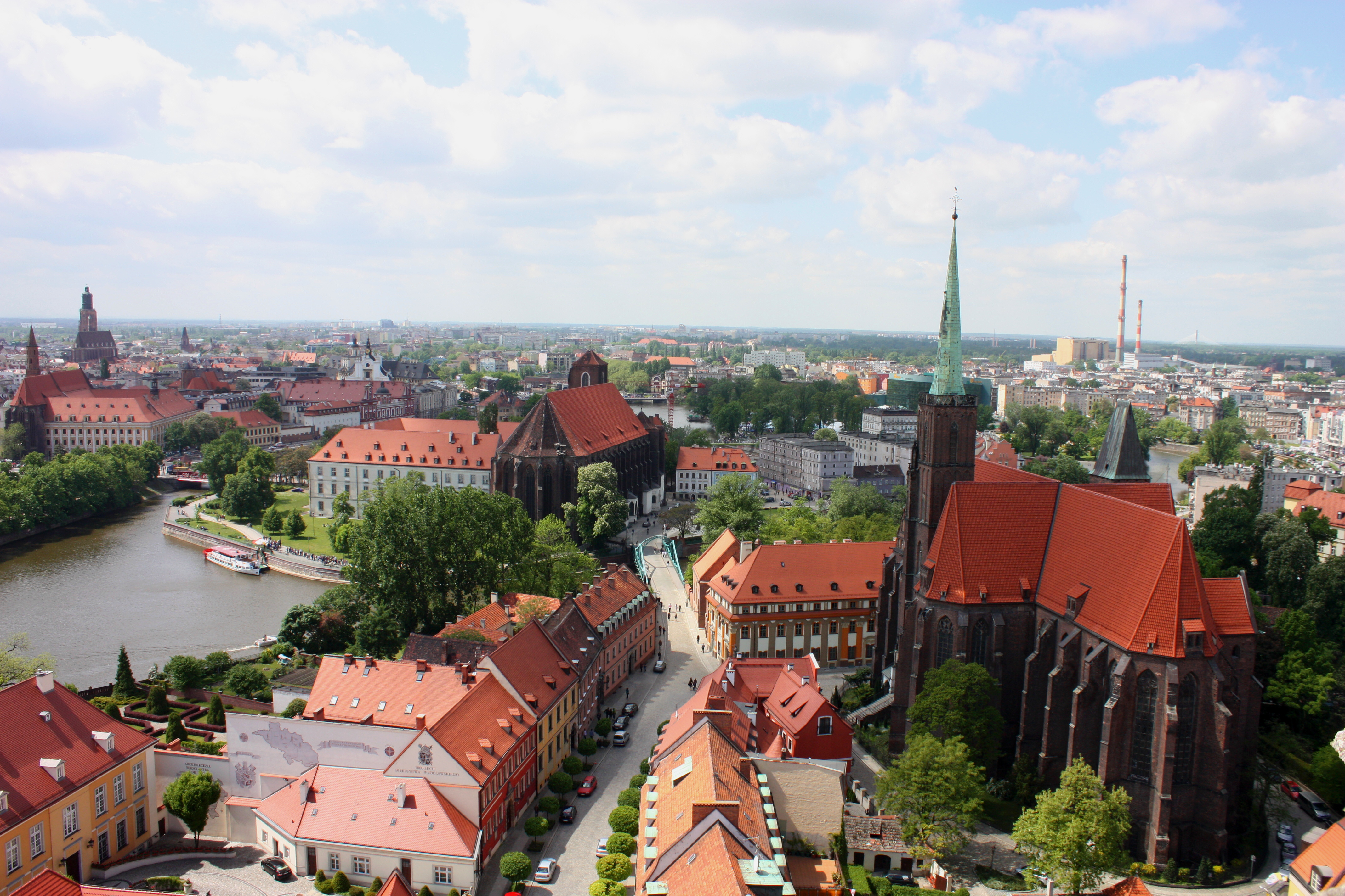 Wrocław, zespół urbanistyczny Ostrowia Tumskiego i wysp: Piaskowej, Bielarskiej, Słodowej